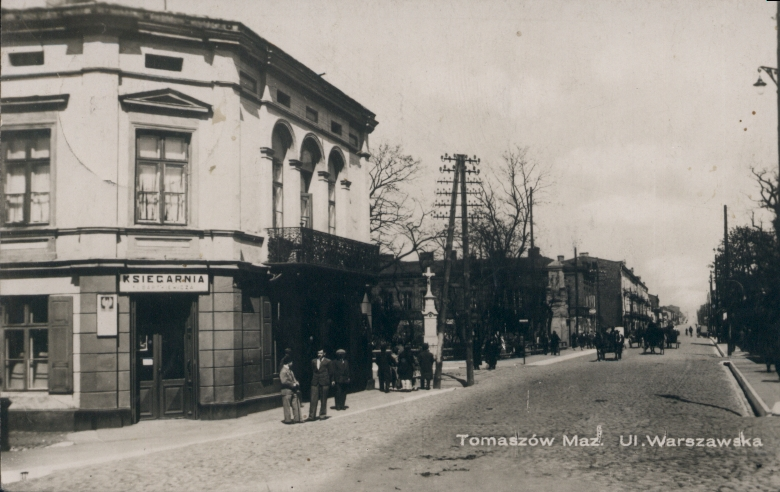 Rynek św.Tekli. Róg dzisiejszych ulic Warszawskiej i Barlickiego (wówczas św.Tekli)